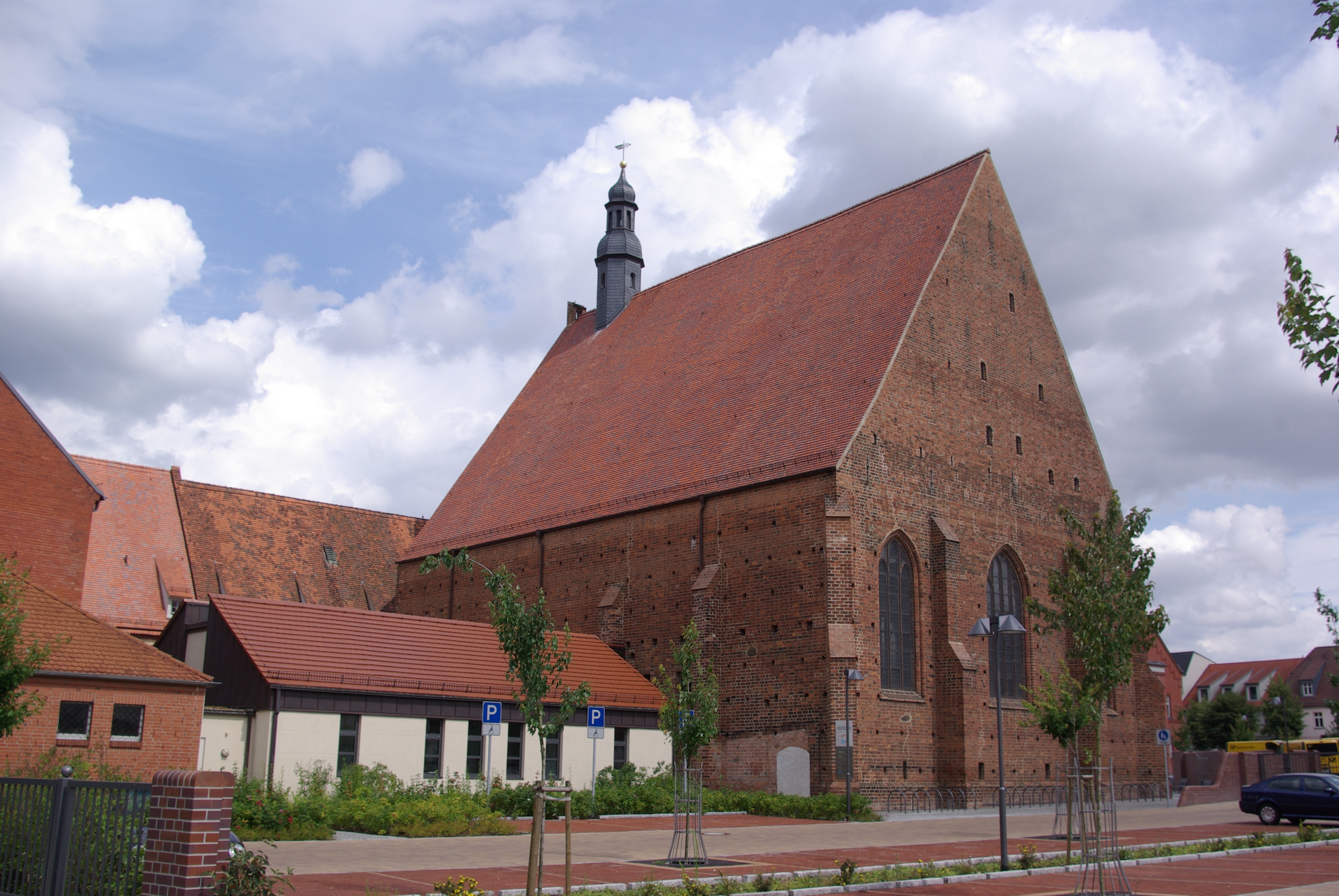 Jüterbog in Brandenburg. Die Mönchenkirche von der Straße Am Frauentor aus. Die Kirche steht unter Denkmalschutz.